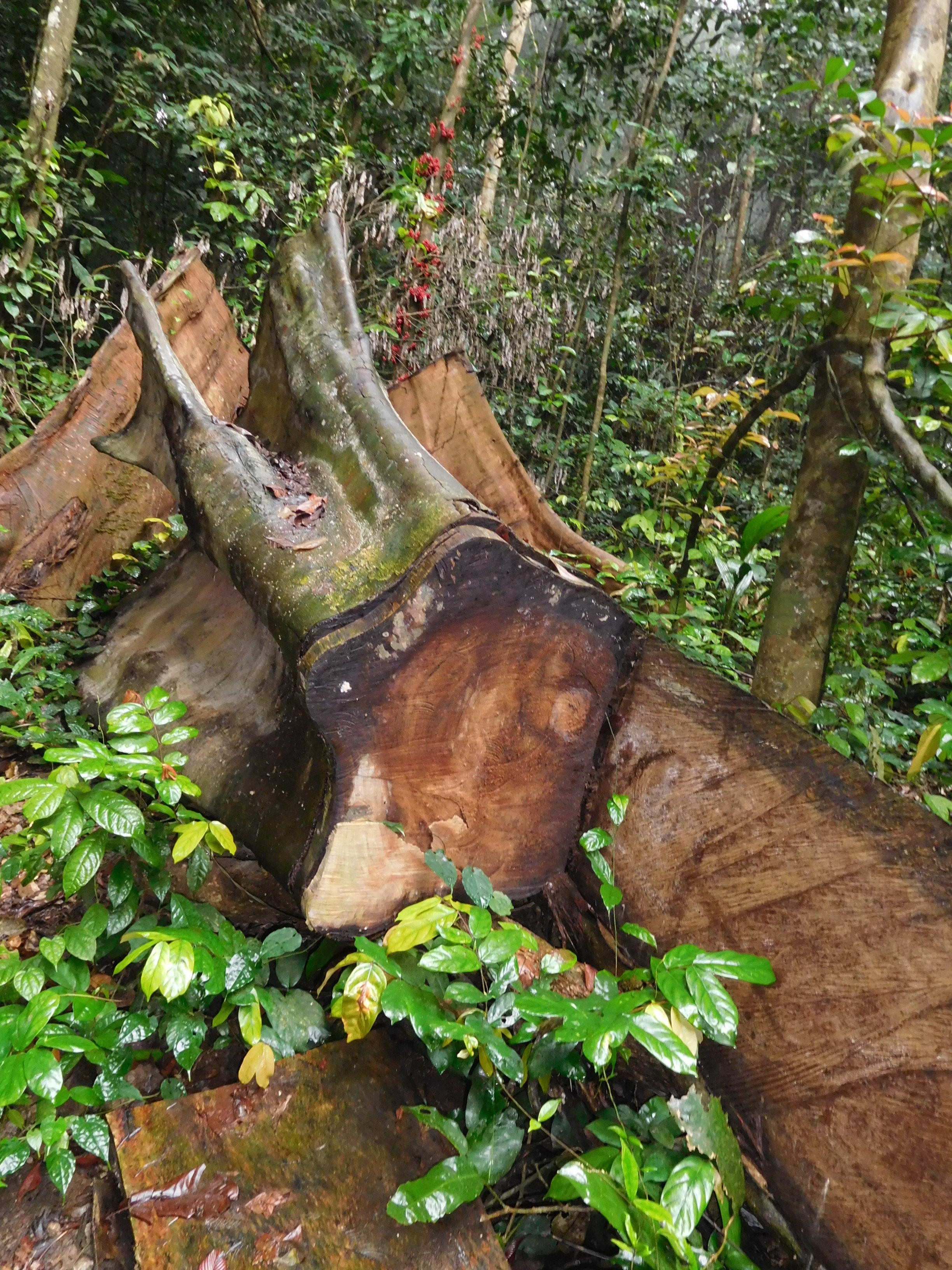 Coupe d'arbre (Tayap, Cameroun)